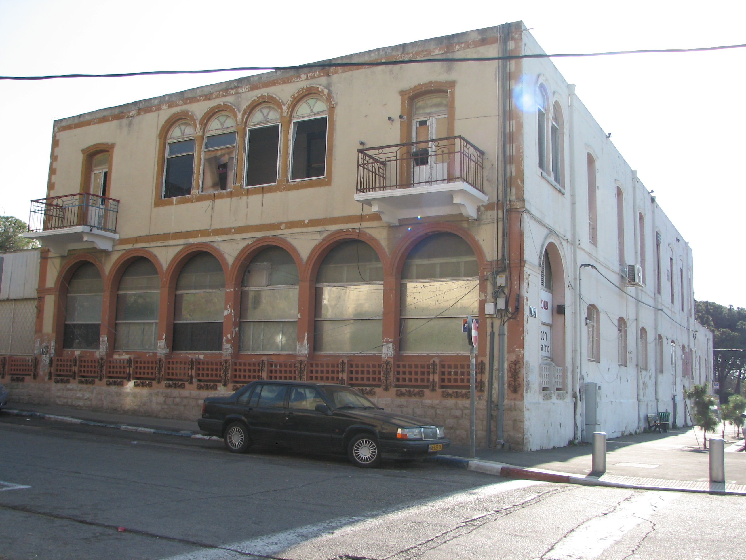 Herzliya Hotels in Haifa, there were three hotels was named "Hotel Herzliya" established in the first half of the 20th century city of Haifa by David Moshe Halevi - Epstein מלונות הרצליה בחיפה היו שלושה מלונות ששמם היה "מלון הרצליה" שהוקמו במחצית הראשונה של המאה ה-20 בעיר חיפה על ידי דוד משה הלוי-אפשטיין מבנה המלון הראשון על הר הכרמל בפינת רחוב קלר והברושים. המלון נפתח בשנת 1923משמש היום כסופרמרקט